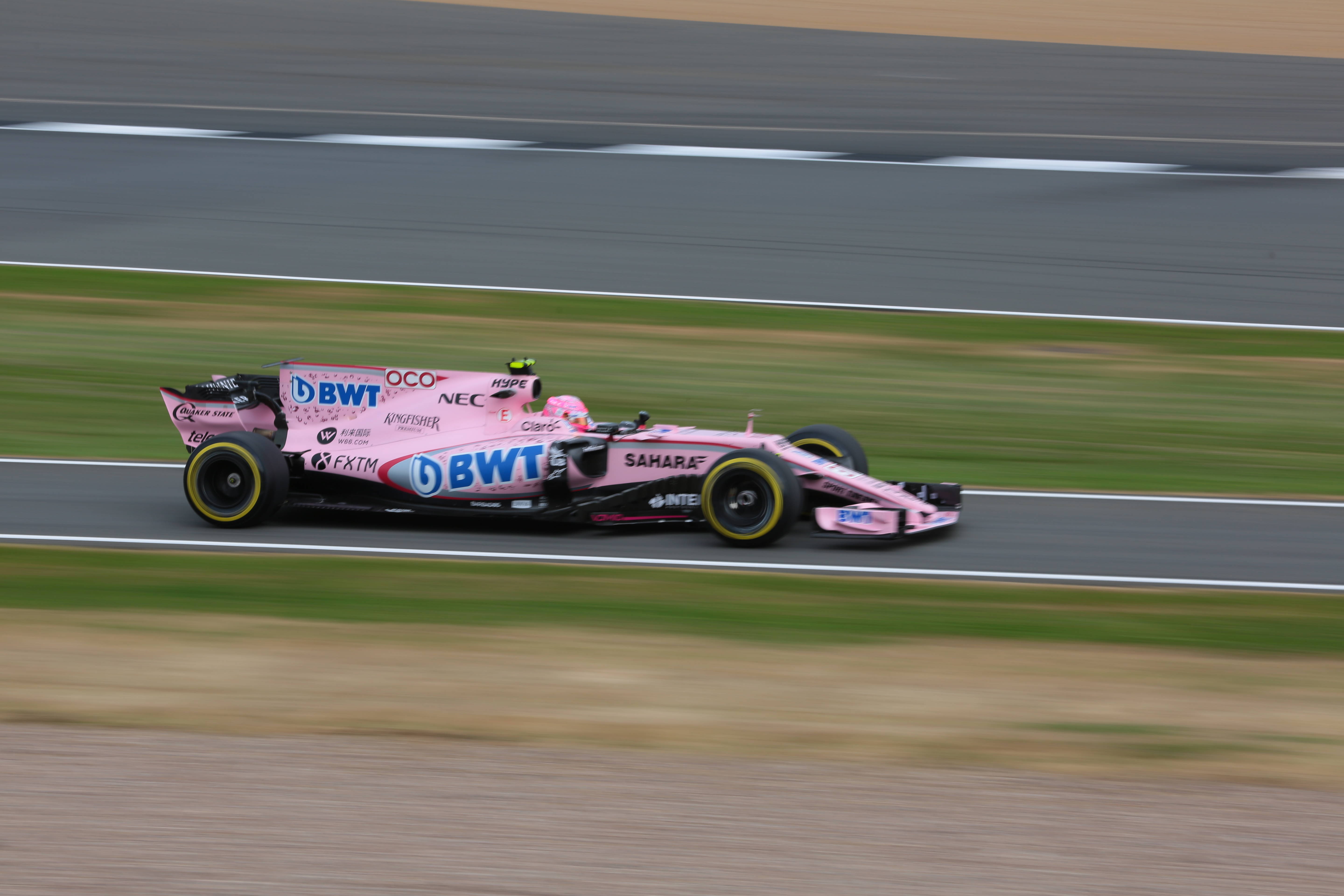 f1